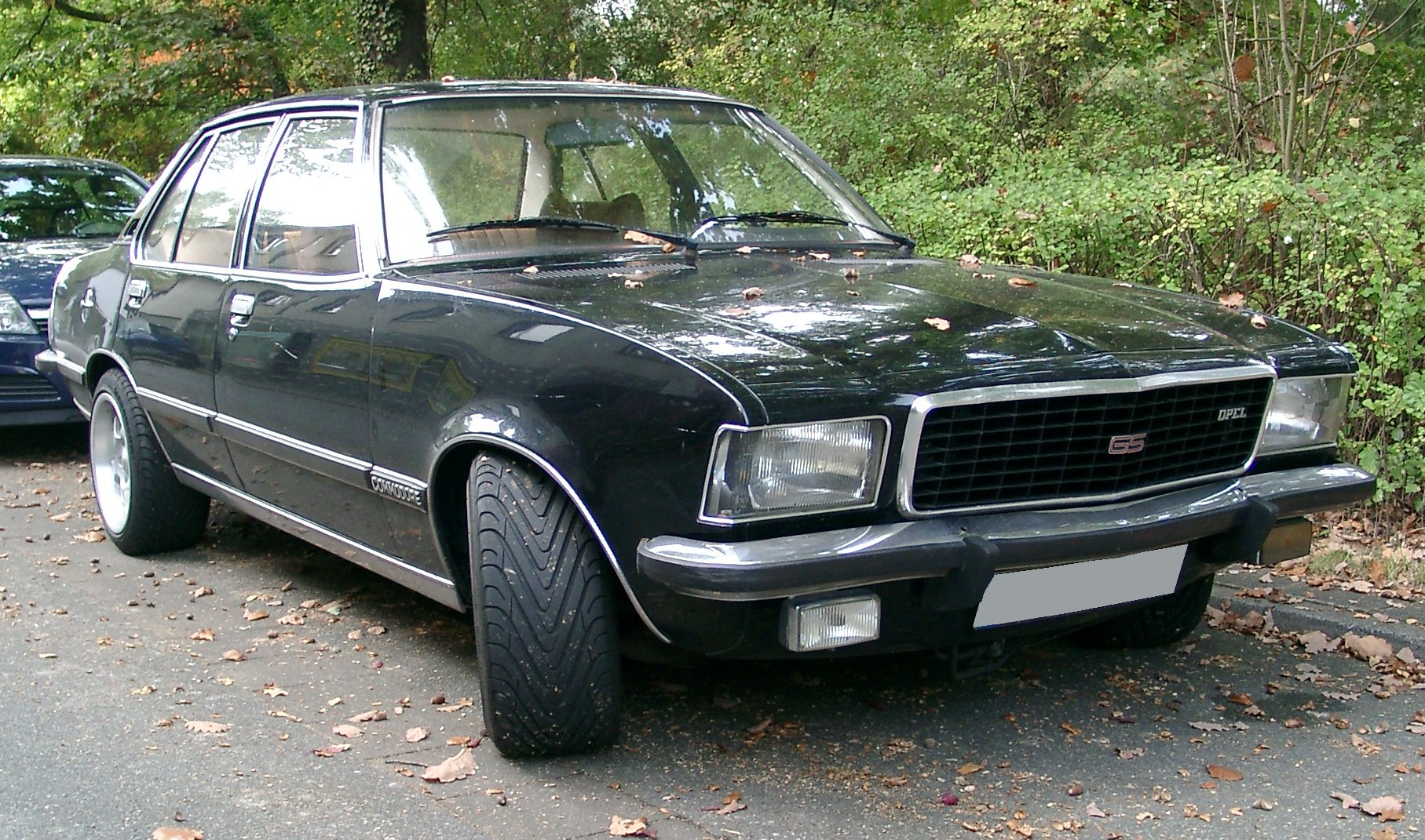 Opel Commodore B